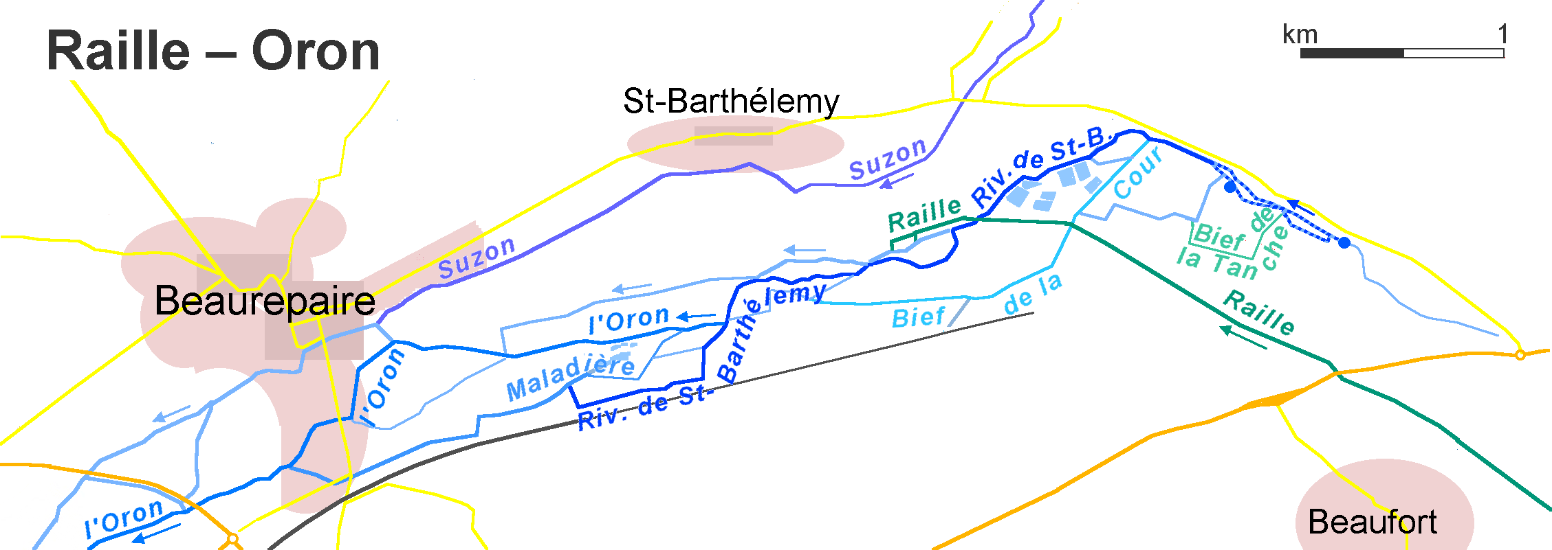 Le réseau des cours d'eau à a continuation de la Raille à l'Oron près de la ville de Beaurepaire en le département de l'Îsere